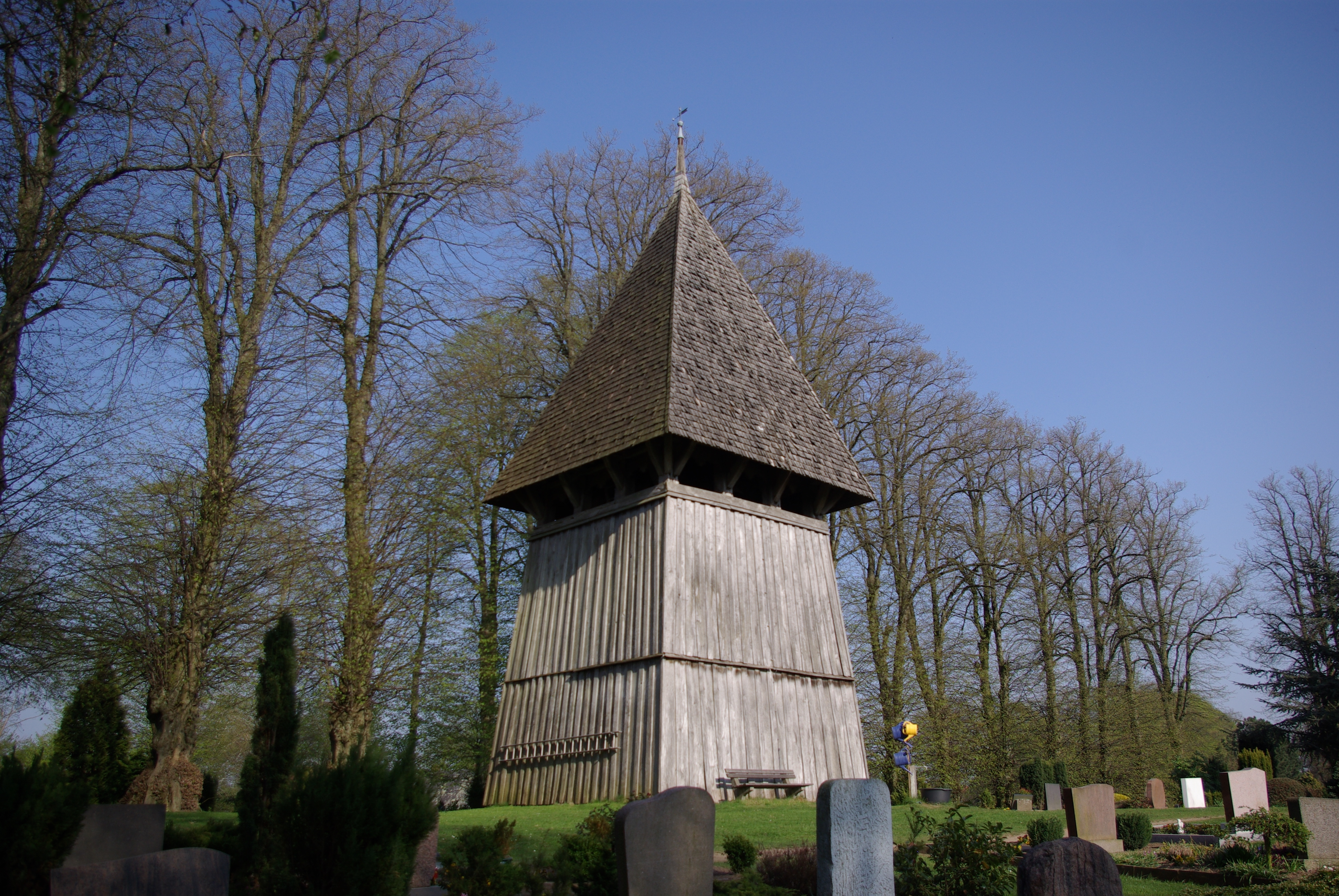 Norderbrarup in Schleswig-Holstein. Die Kirche und der Glockenturm steht unter Denkmalschutz.